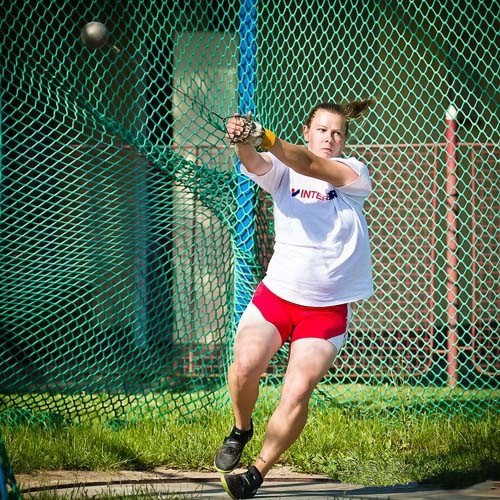 Orbán Éva magyar kalapácsvető